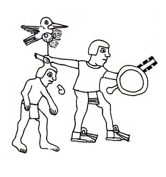 Huehue Huitzilihuitl es capturado por un colhua en 1299, así aparece en la lámina XX del Códice Boturini.